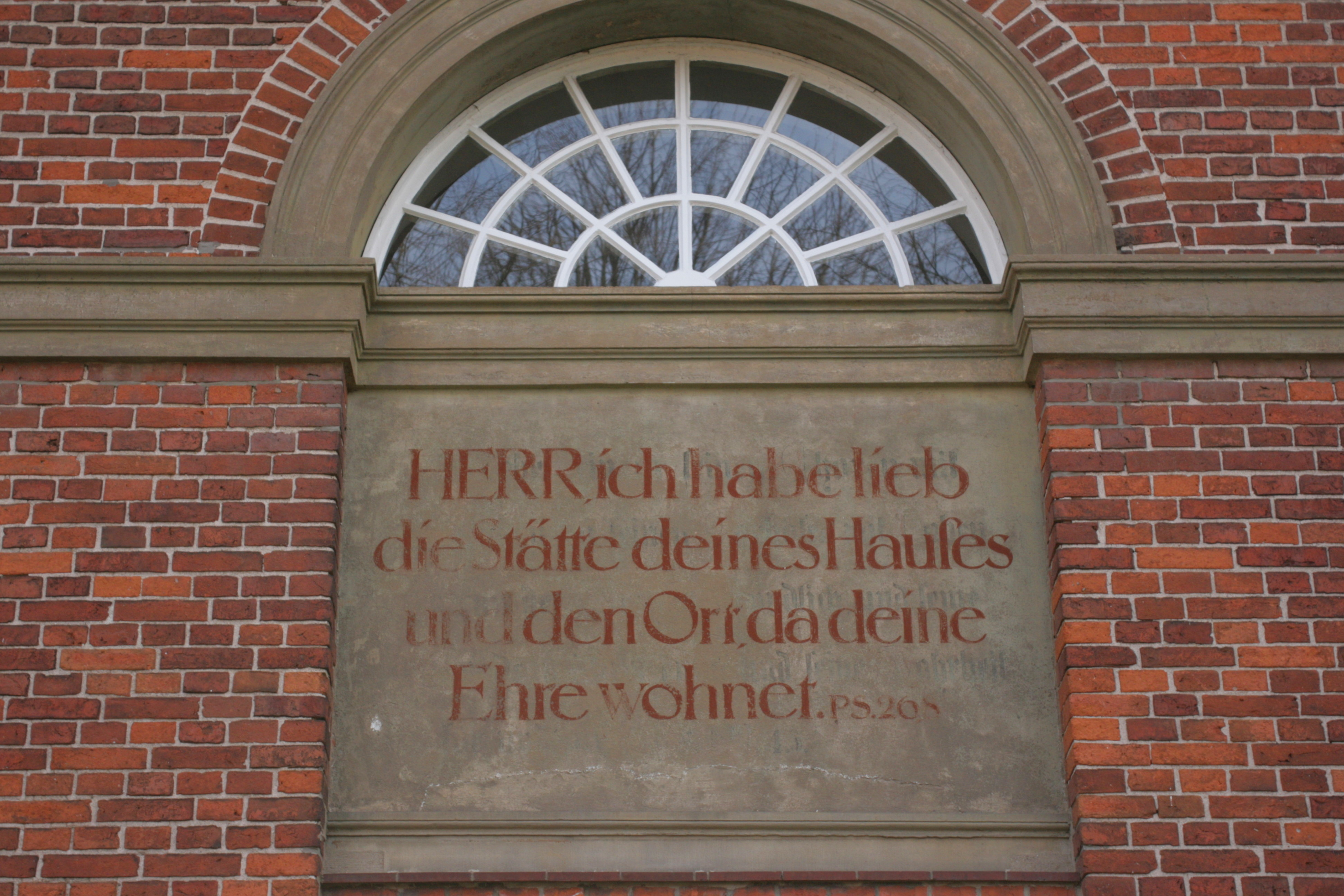 St.-Michaelis-Kirche im Dreieck Bahnhofstraße/Niendorfer Straße/Kirchplatz in Bienenbüttel